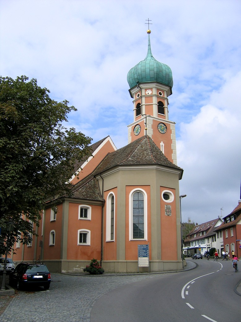 Bildbeschreibung: Allensbach, Nikolauskirche. Fotograf: Mussklprozz Datum: de:13. September de:2005 andere Versionen: keine